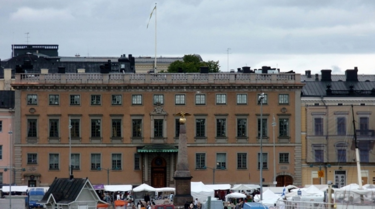 Sveriges ambassad i Helsingfors